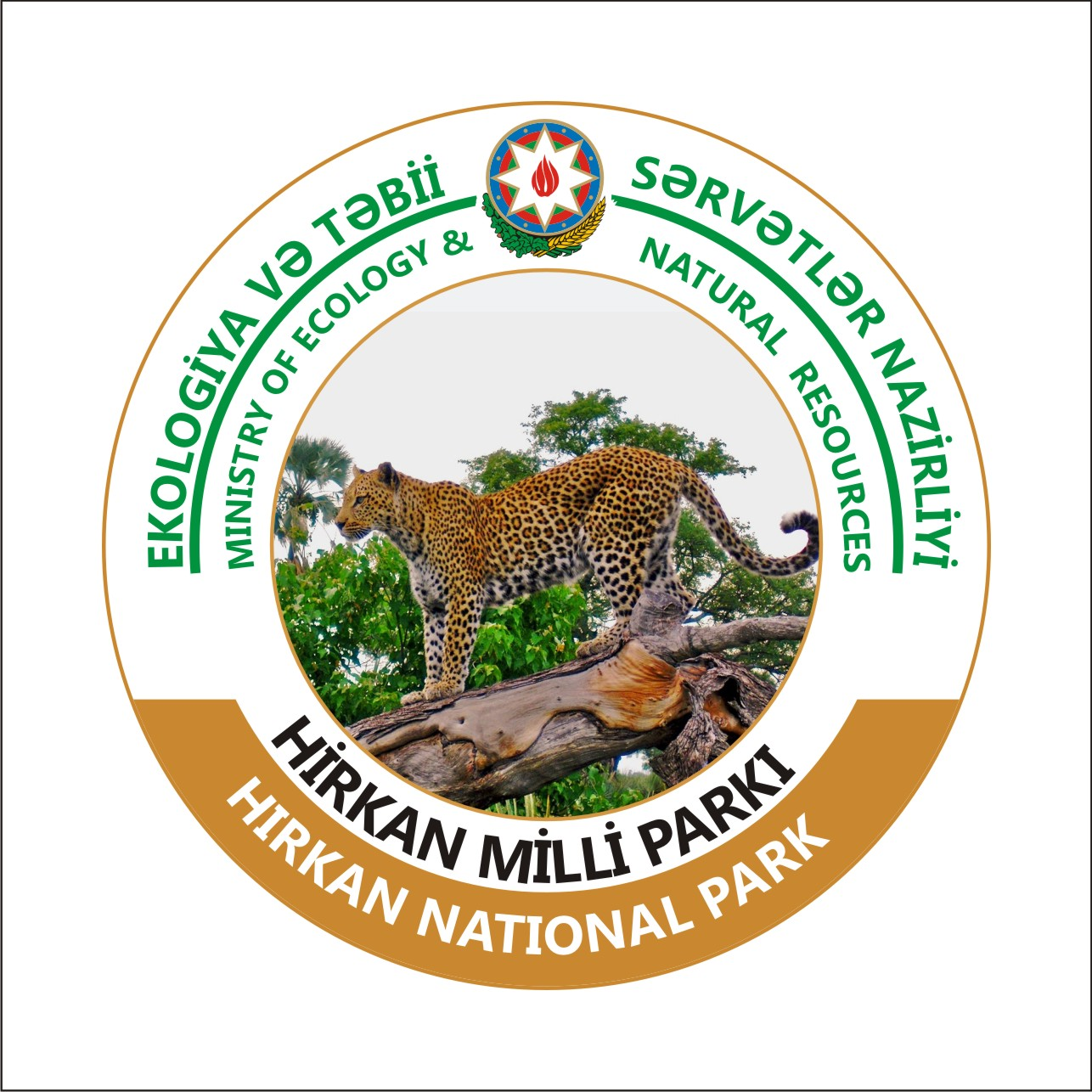 Milli Parkın loqosu